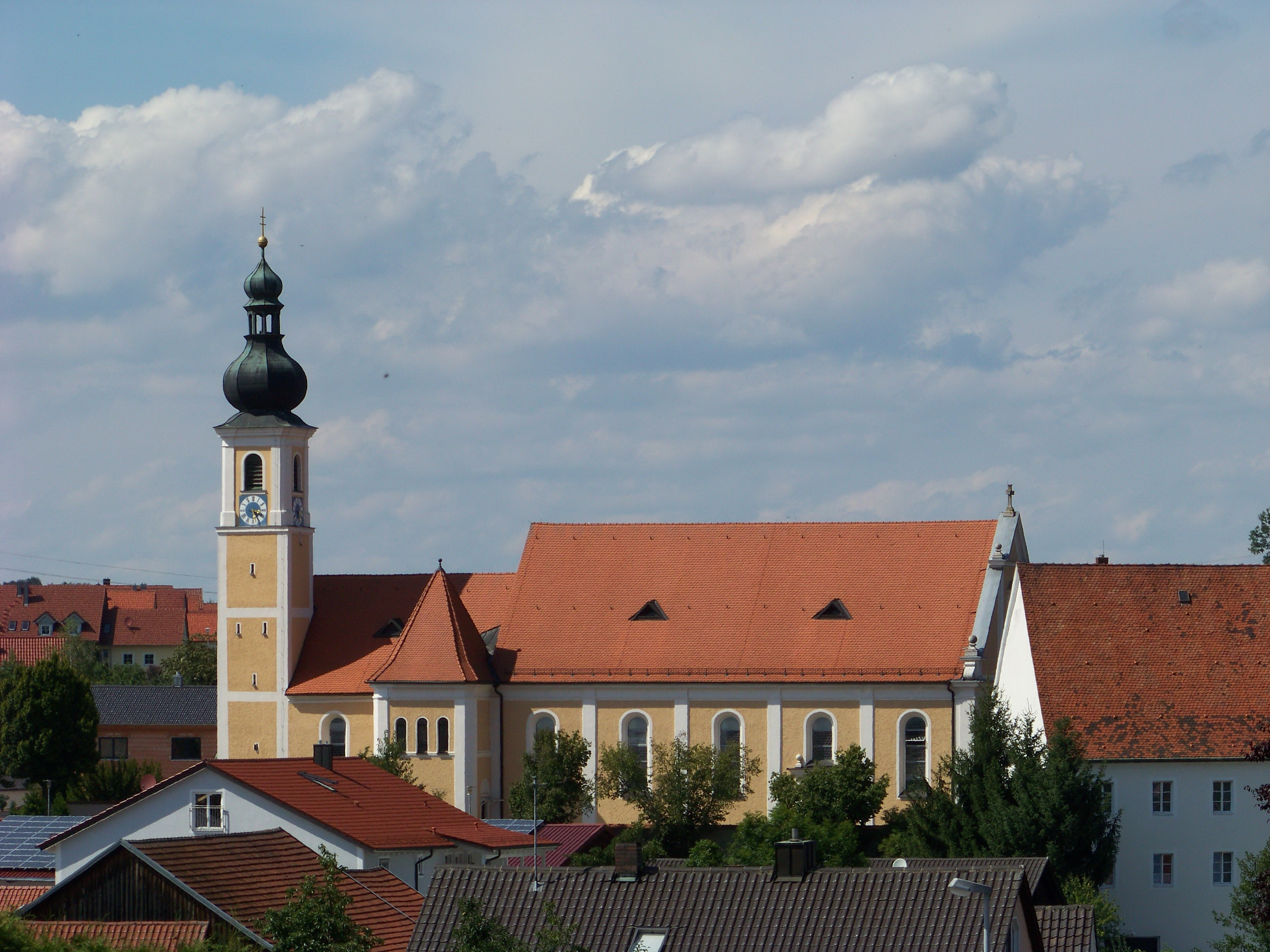 Thalmassing. Katholische Pfarrkirche St. Nikolaus von Myra, Saalbau mit eingezogenem Chor, Flankenturm mit Zwiebelhaube und Pilastergliederung, neubarock, 1901 von Georg Strebel, Chor und Turm im Kern mittelalterlich; mit Ausstattung, westlich angebaut Lourdeskapelle mit Opferstock von 1591; Friedhofsmauer mit Blendnischen, wohl 19. Jahrhundert